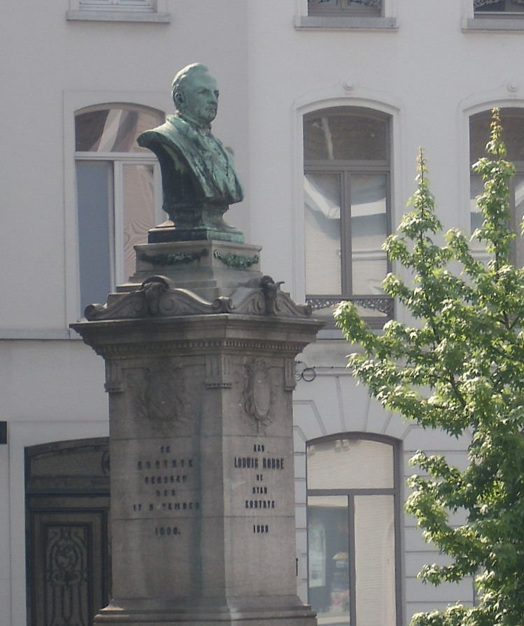 Borstbeeld van de kunstschilder Louis Robbe (1806-1887), Louis Robbeplein - 8500 Kortrijk - België.